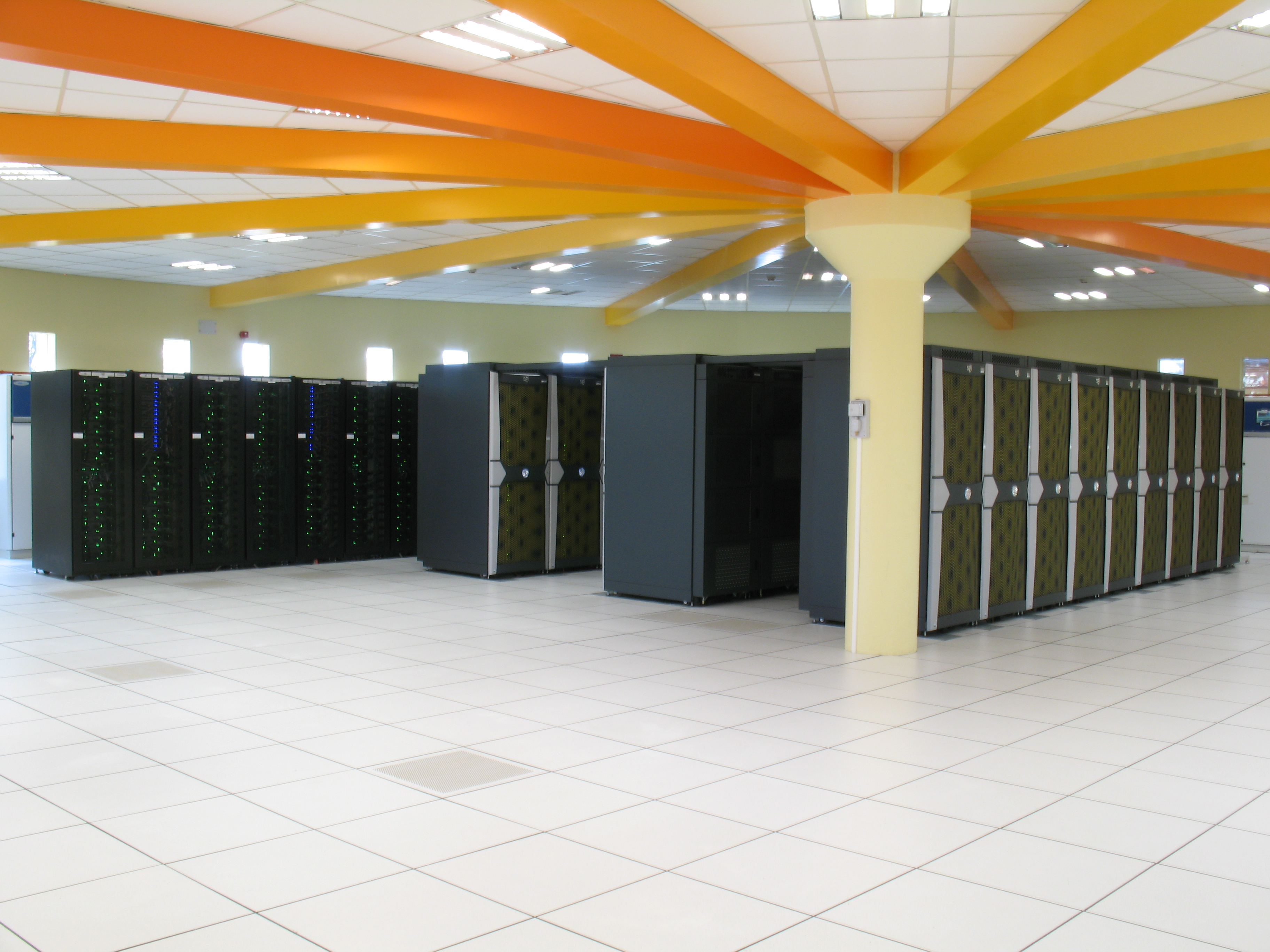 centre de calcul du CINES (Centre Informatique National de l’Enseignement Supérieur) à Montpellier (Hérault)